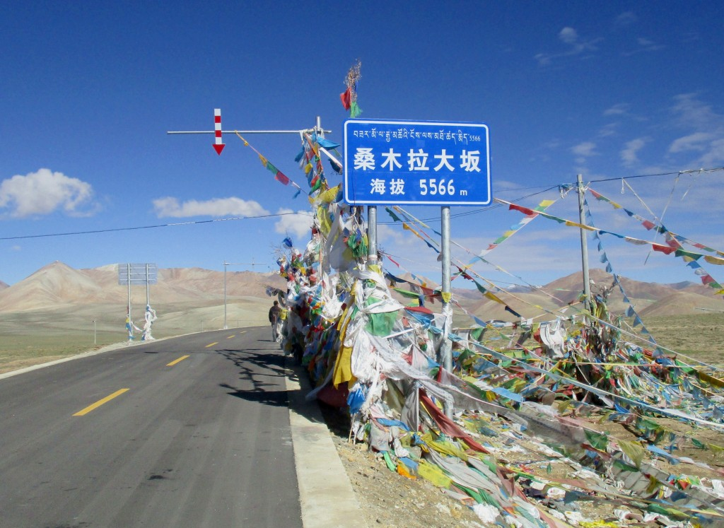 Bild vom höchsten Pass der Welt